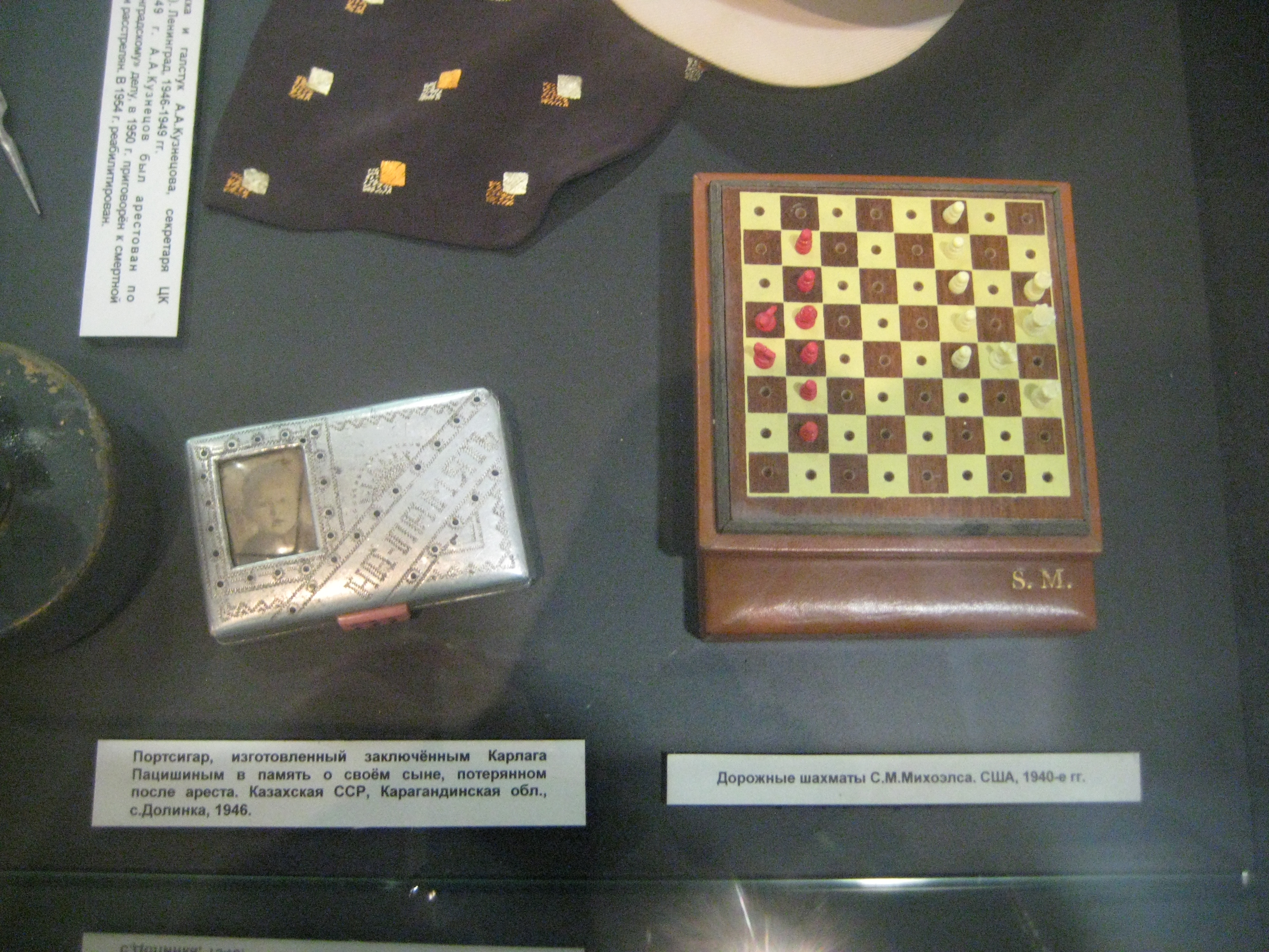 Шахматы дорожные С. Михоэлса. США, 1940-е. Музей современной истории России